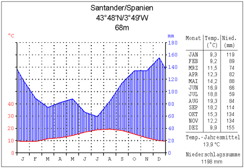 Klimadiagramm Santander